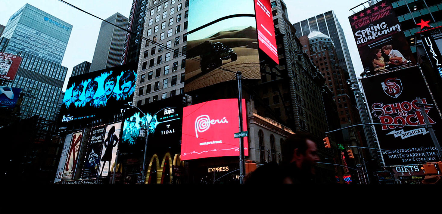 Marca Perú en Times Square